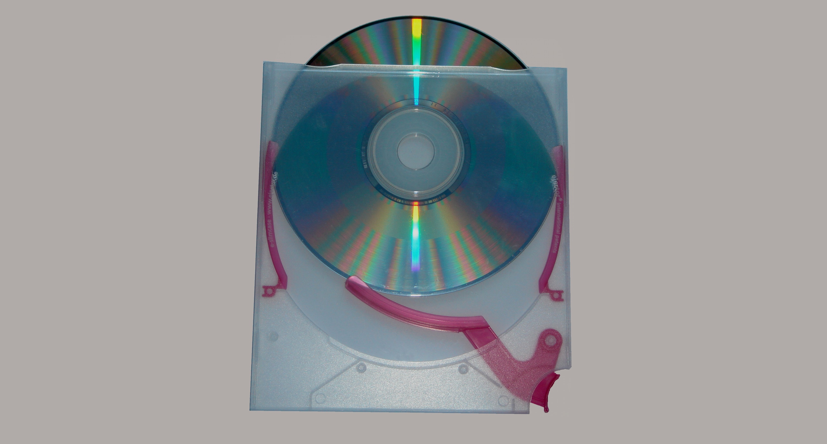 Envase ergonómico para CDs Kickout box. Picture taken by ocrho.